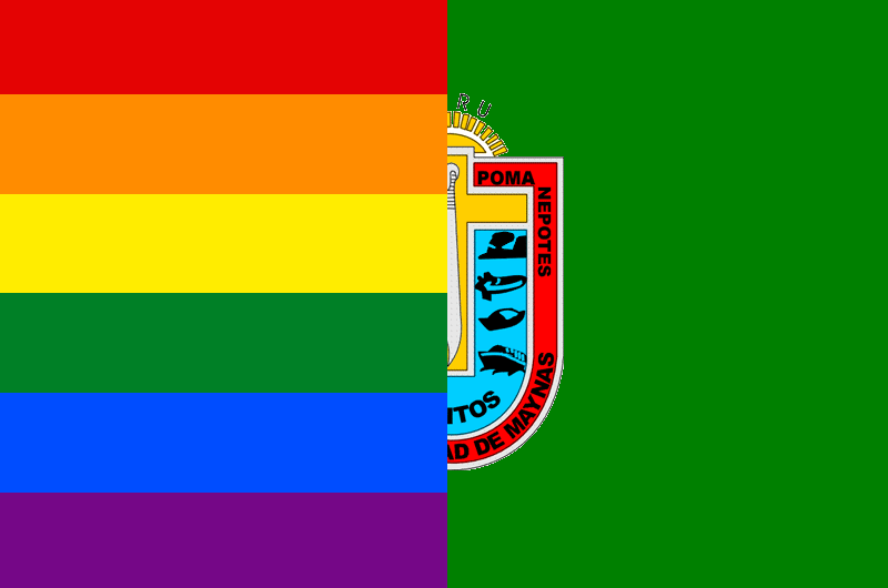 Bandera que representa la tolerancia de la ciudadanía de la ciudad ante los derechos de los Homosexuales y lesbianas